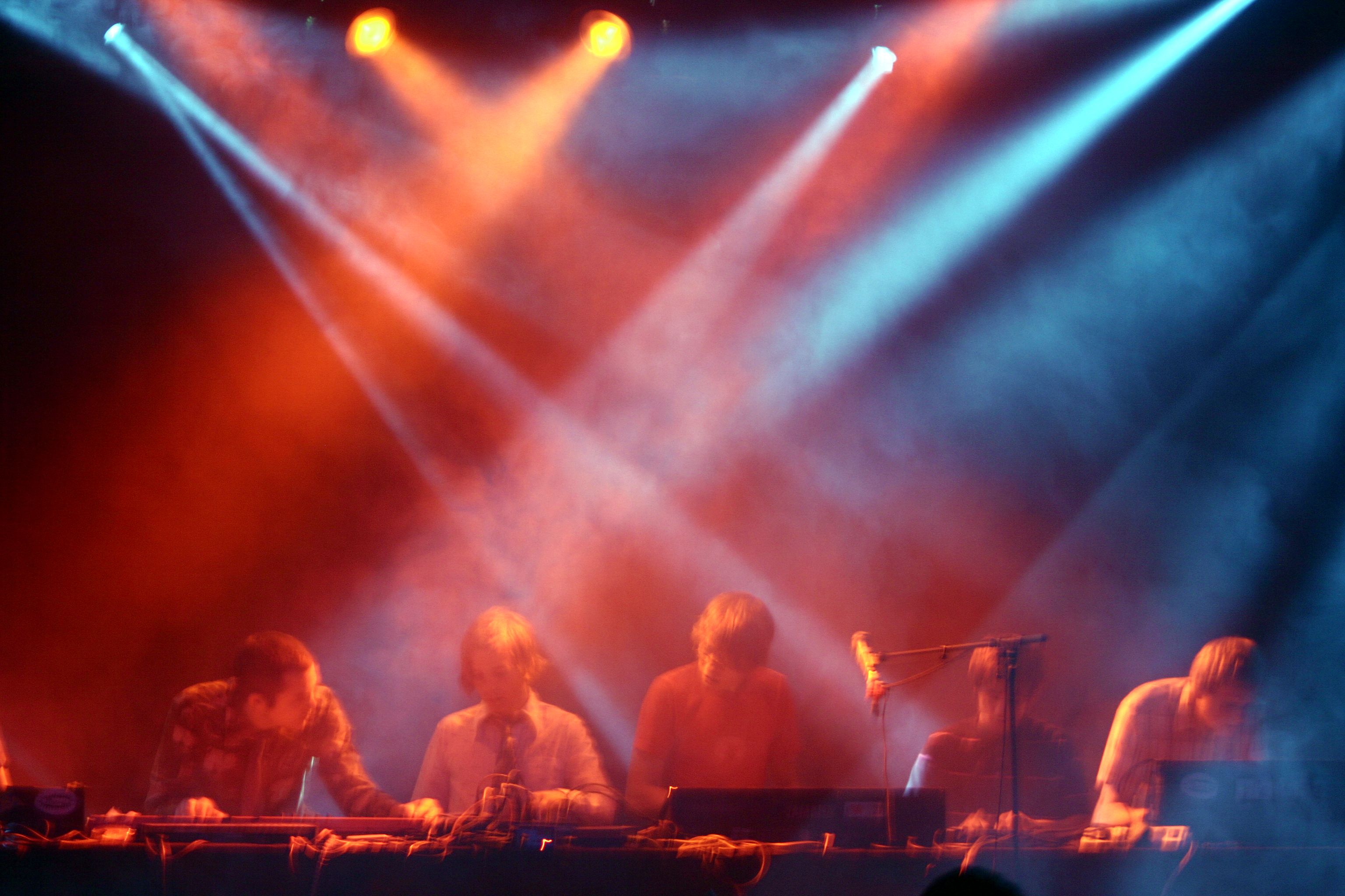 Slagsmålsklubben. Live at Debaser Medis.